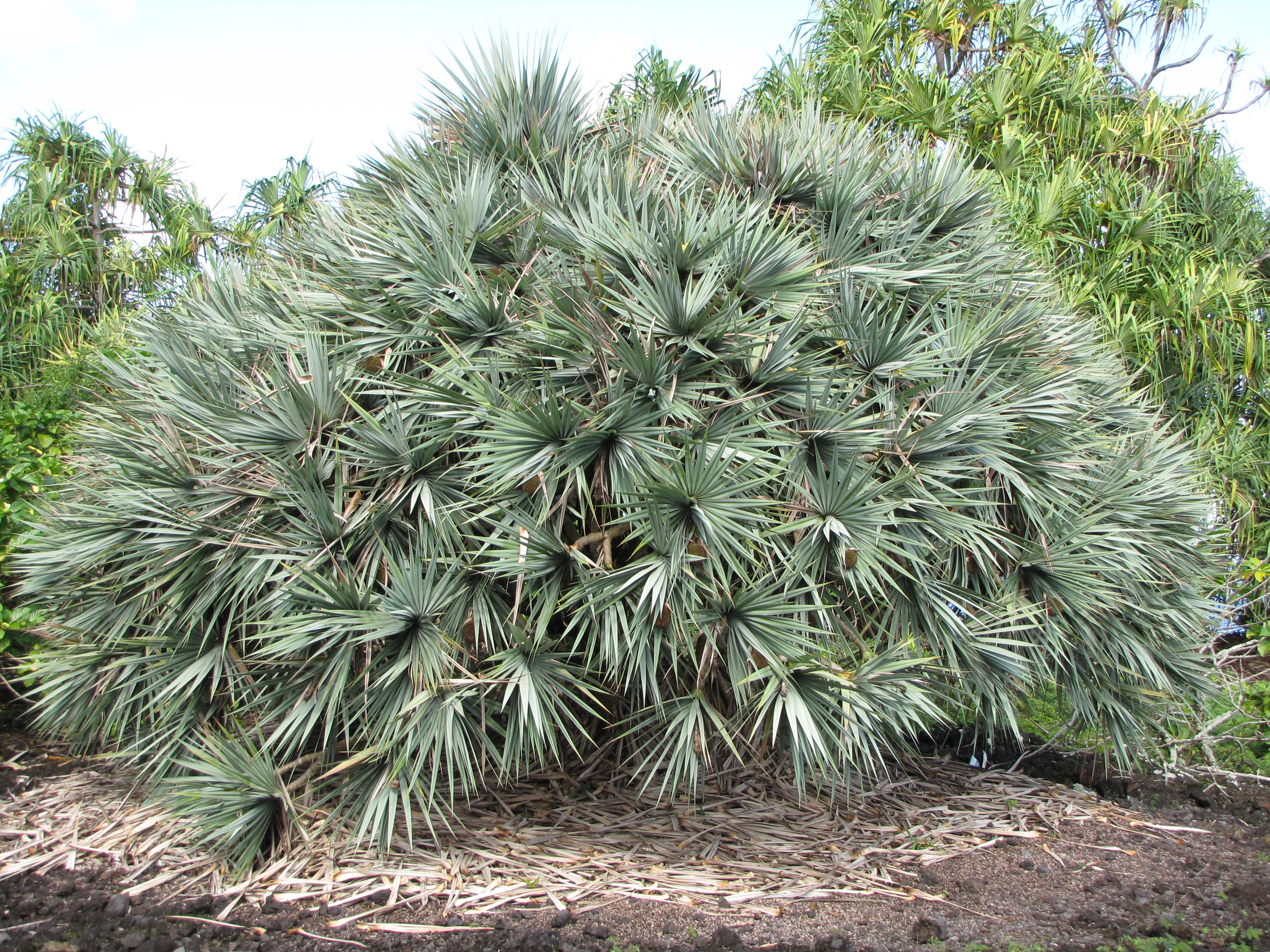 Pandanus vandermeeschii (Pandanus) Habit at Kahanu Gardens NTBG Kaeleku Hana, Maui, Hawaii. November 04, 2009 #091104-8836 Image Use Policy